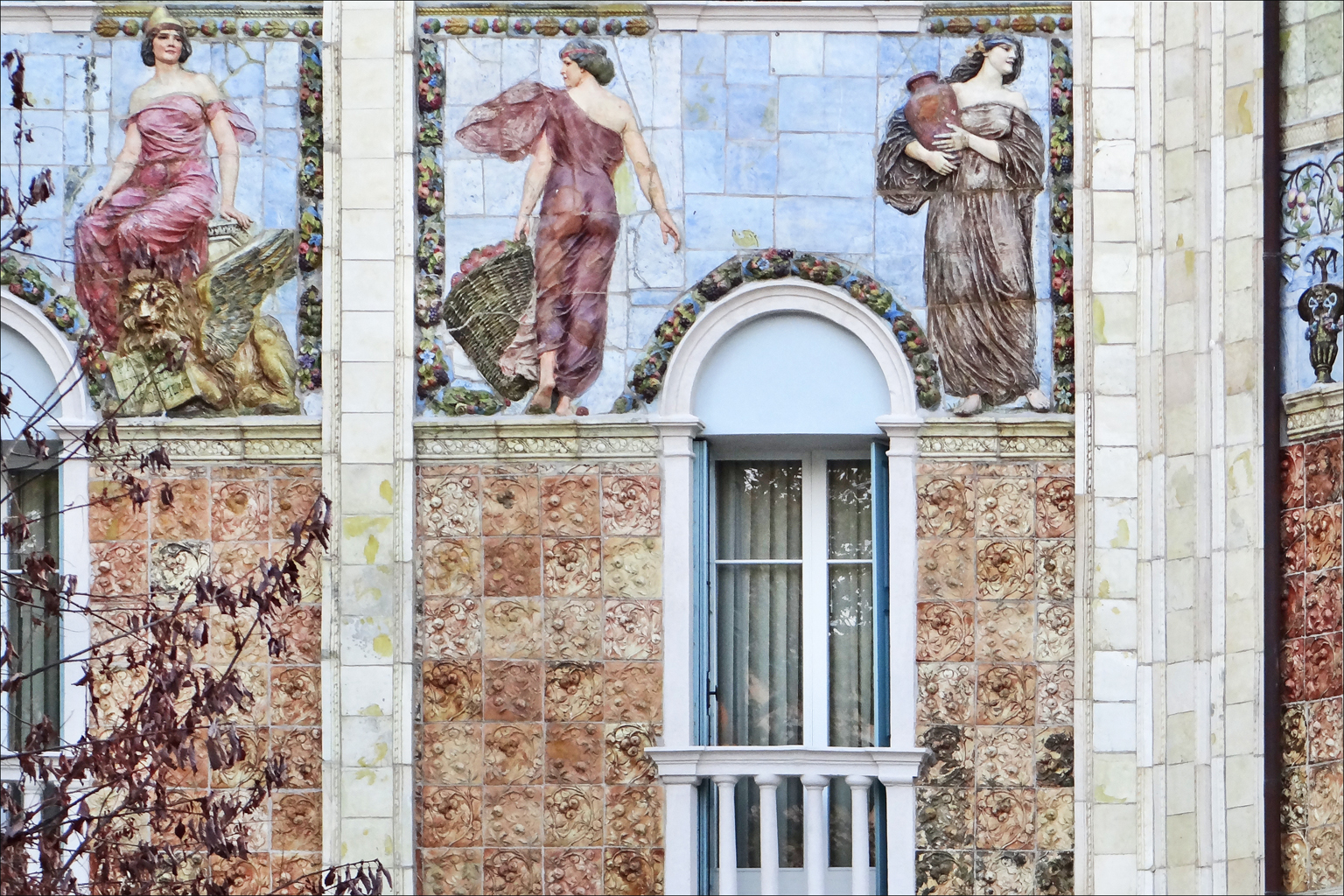 Décor de la façade du grand hôtel Ausonia Hungaria Cet hôtel de style Liberty, situé sur la "gran viale", a été conçu en 1905-1908 par l'architecte Nicolo Piamonte pour Luigi Fabrizio. La façade est recouverte de majoliques polychromes, de motifs et de frises représentant des fleurs et des allégories féminines. ___________